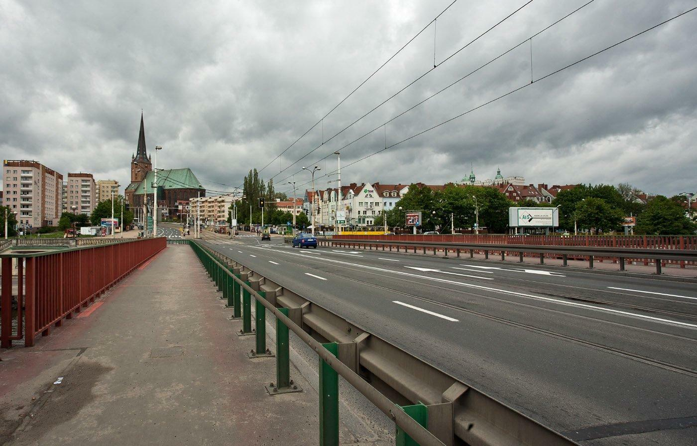 Widok z mostu w kierunku zachodnim - jego przedłużeniem jest ul. Wyszyńskiego. Po prawej stronie współcześnie odbudowane kamienice Starego Miasta. Po lewej wyszło inaczej.